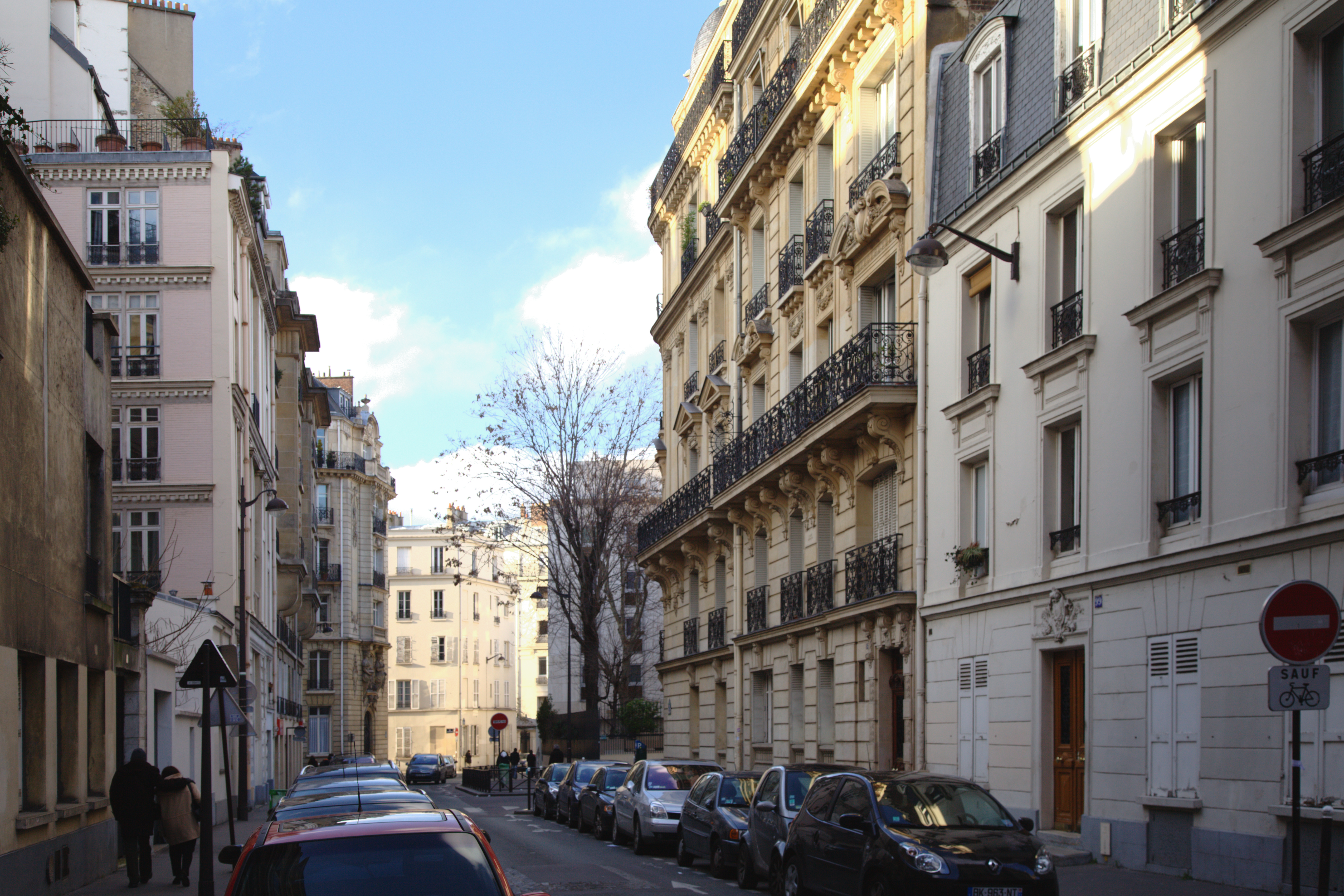 La rue Notre Dame des Champs à Paris. Prise au niveau de la rue Le Verrier, vue en direction nord-ouest